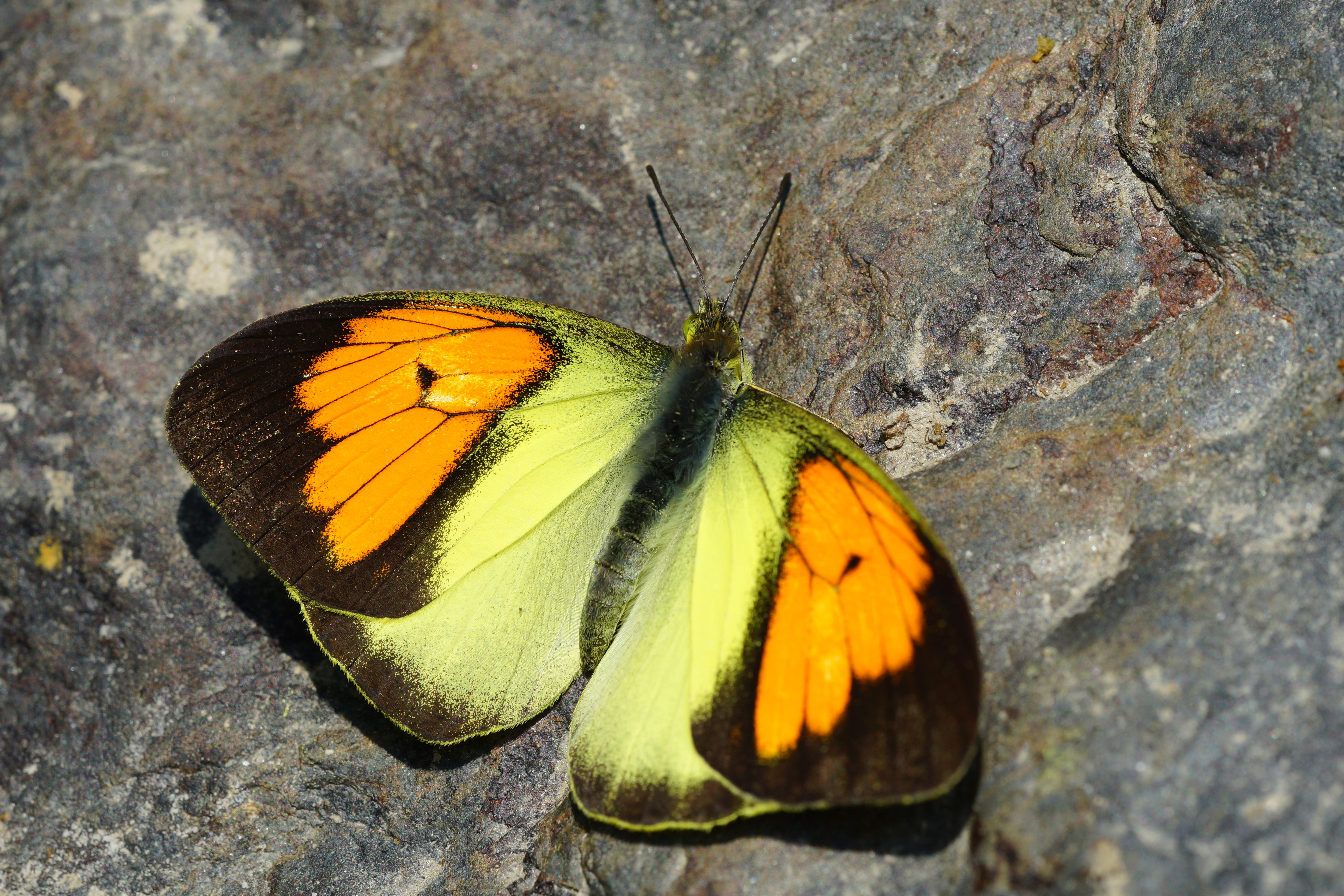 異粉蝶 Ixias pyrene insignis